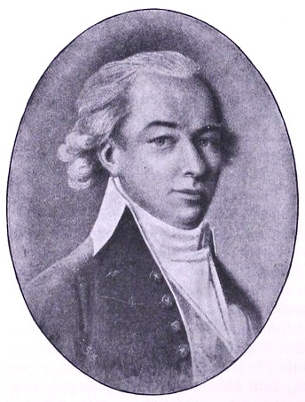 Amiral Salomon Maurits von Rajalin